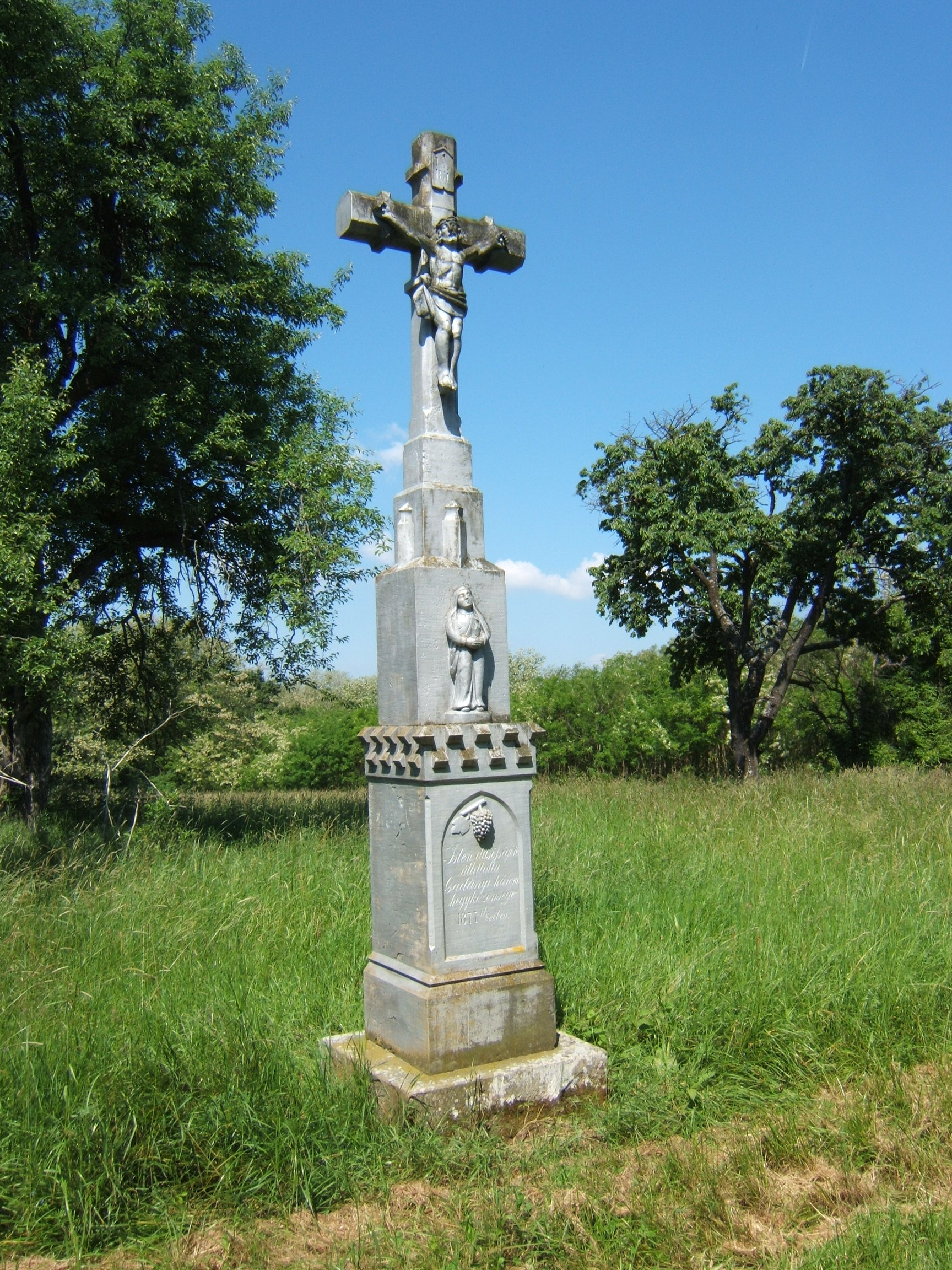 Gadány, kőkereszt